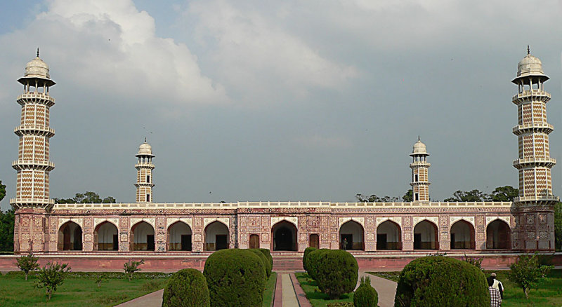 Jahangir's Tomb at Shahdara, near Lahore, Pakistan.